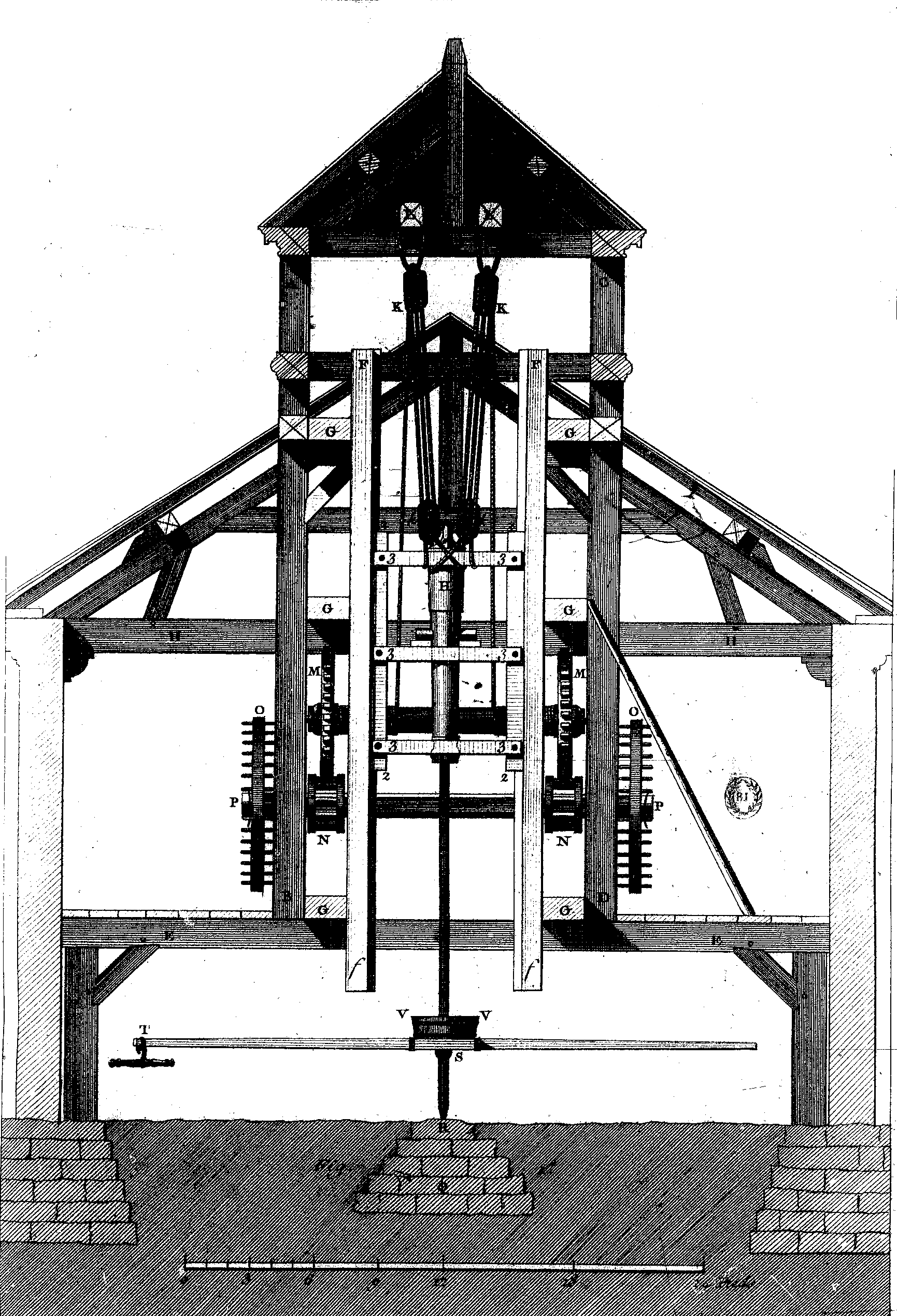 Planches de l'Encyclopédie de Diderot et d'Alembert, volume 4